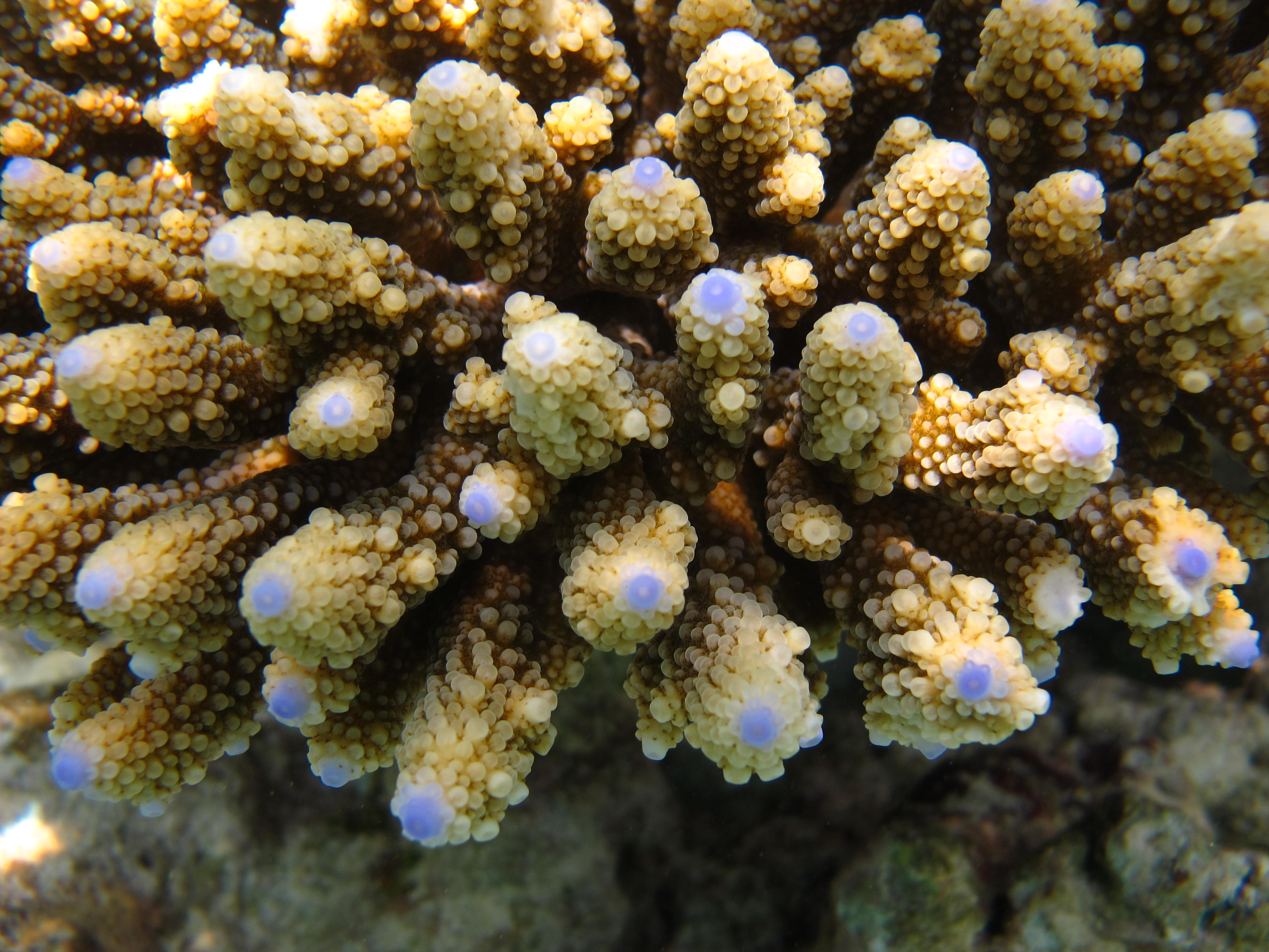 Gros plan sur du corail Acropora digitifera aux Maldives (atoll de Baa).